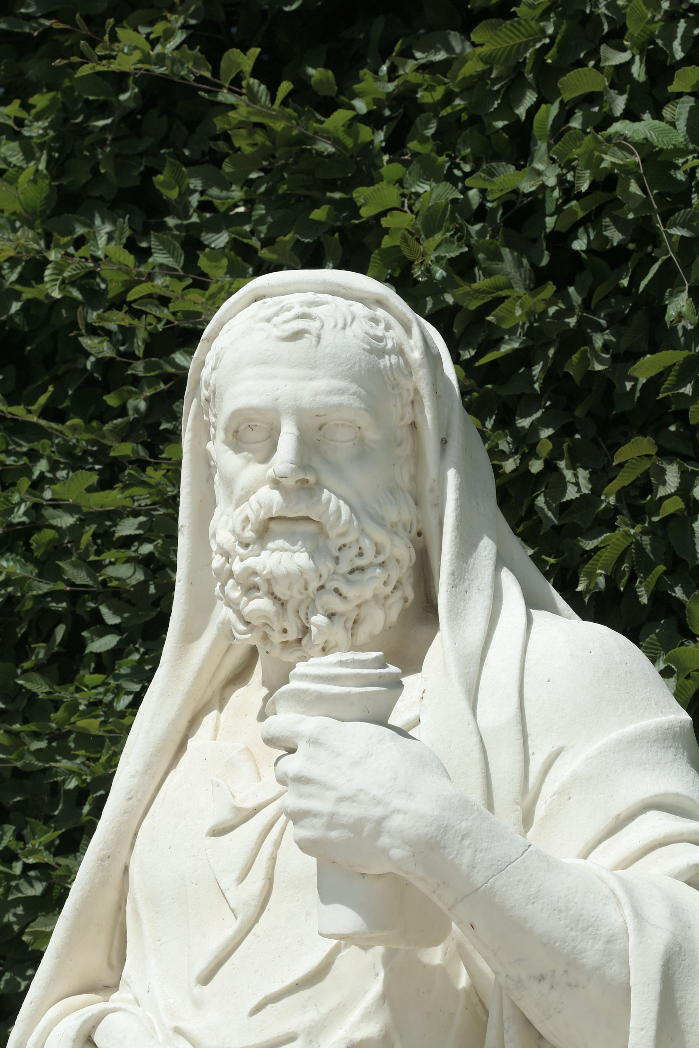 Parc de Versailles, Rond-Point des Philosophes. Lysias, Jean Dedieu inv1850n°9452